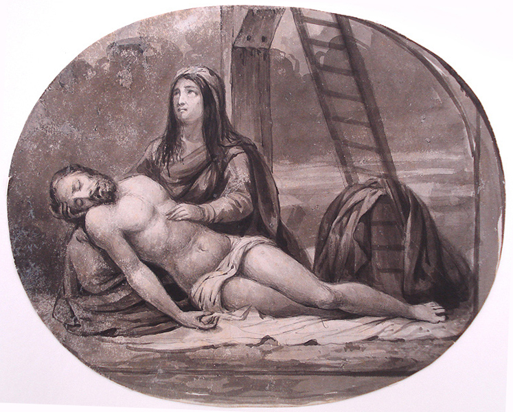 Manuel de Araújo Porto-alegre, Pietà, aguada sobre papel, sem data, acervo do Museu Júlio de Castilhos